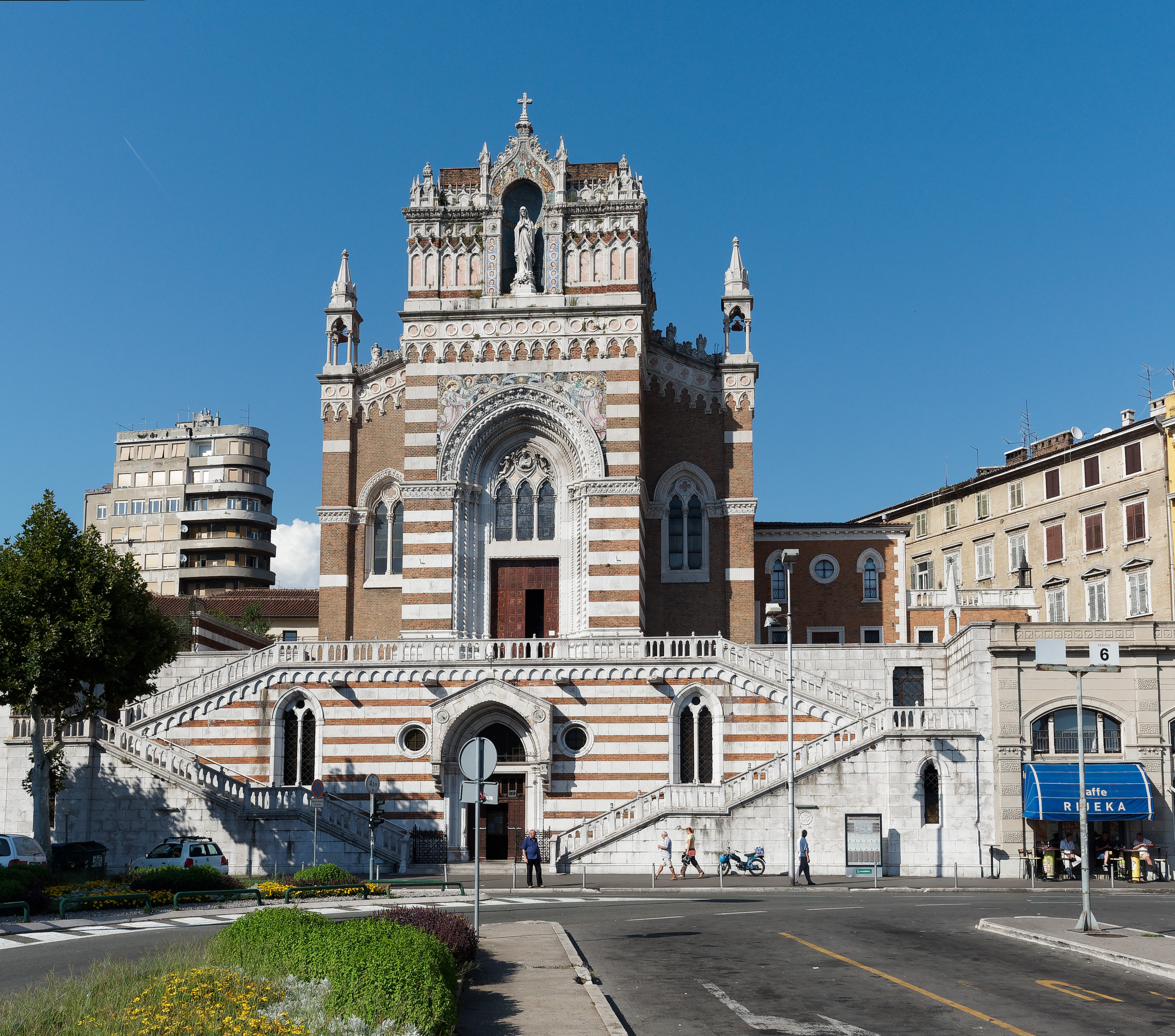 Fassade, Portal und Krypta der Kapuzinerkirche Unserer Lieben Frau von Lourdes in Rijeka, Kroatien